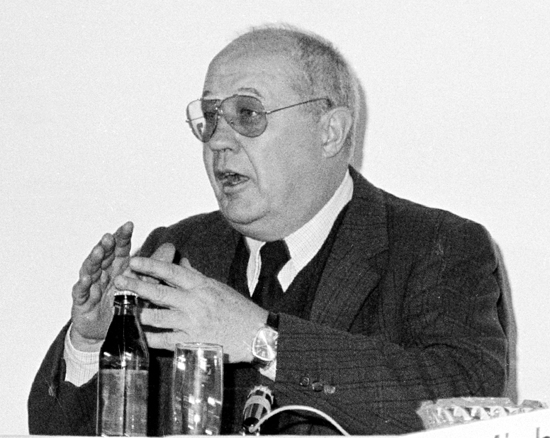 Dagobert Lindlau (deutscher Journalist und Schriftsteller) im Februar 1986 in München.